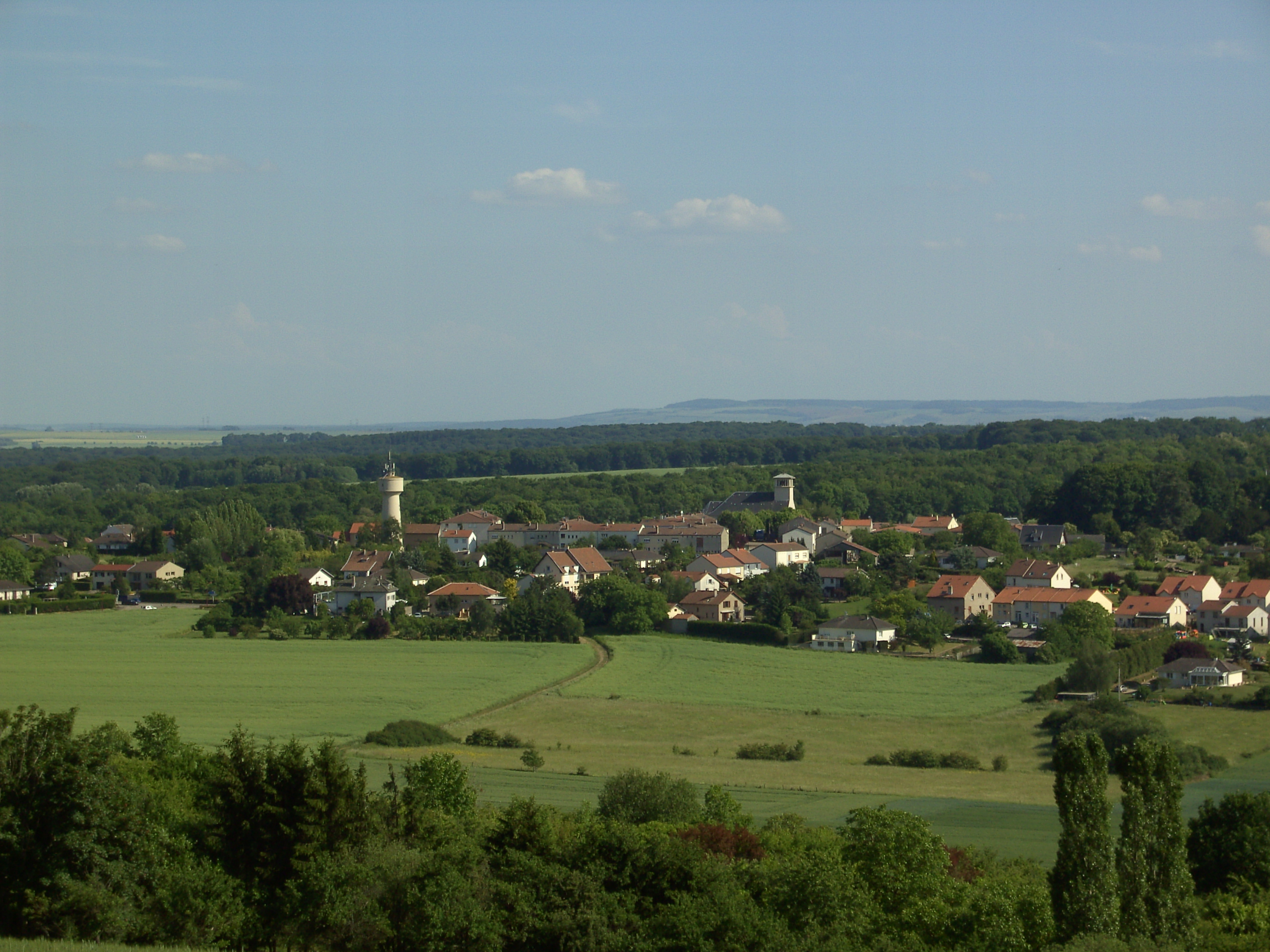 Vue du village Féy depuis la côte de Sommy